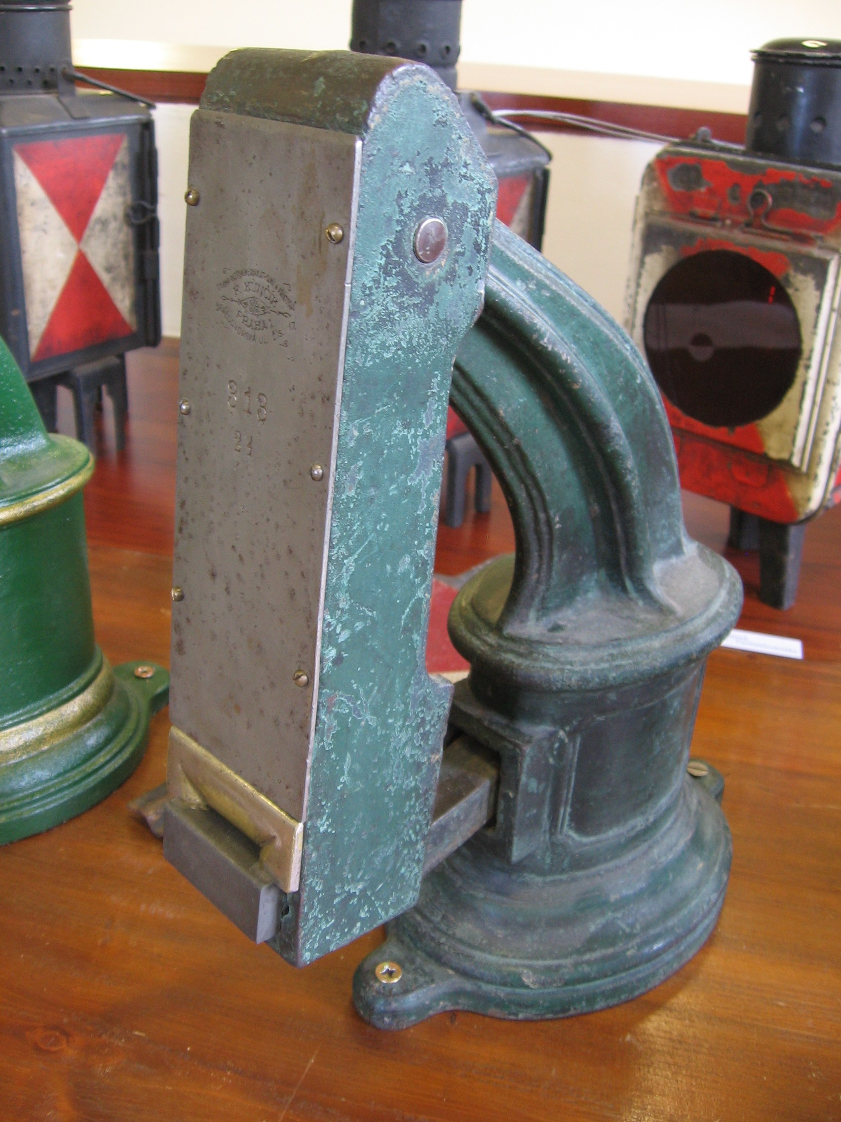 Kompostér firmy Kunčík na zámku Chvaly (Praha).